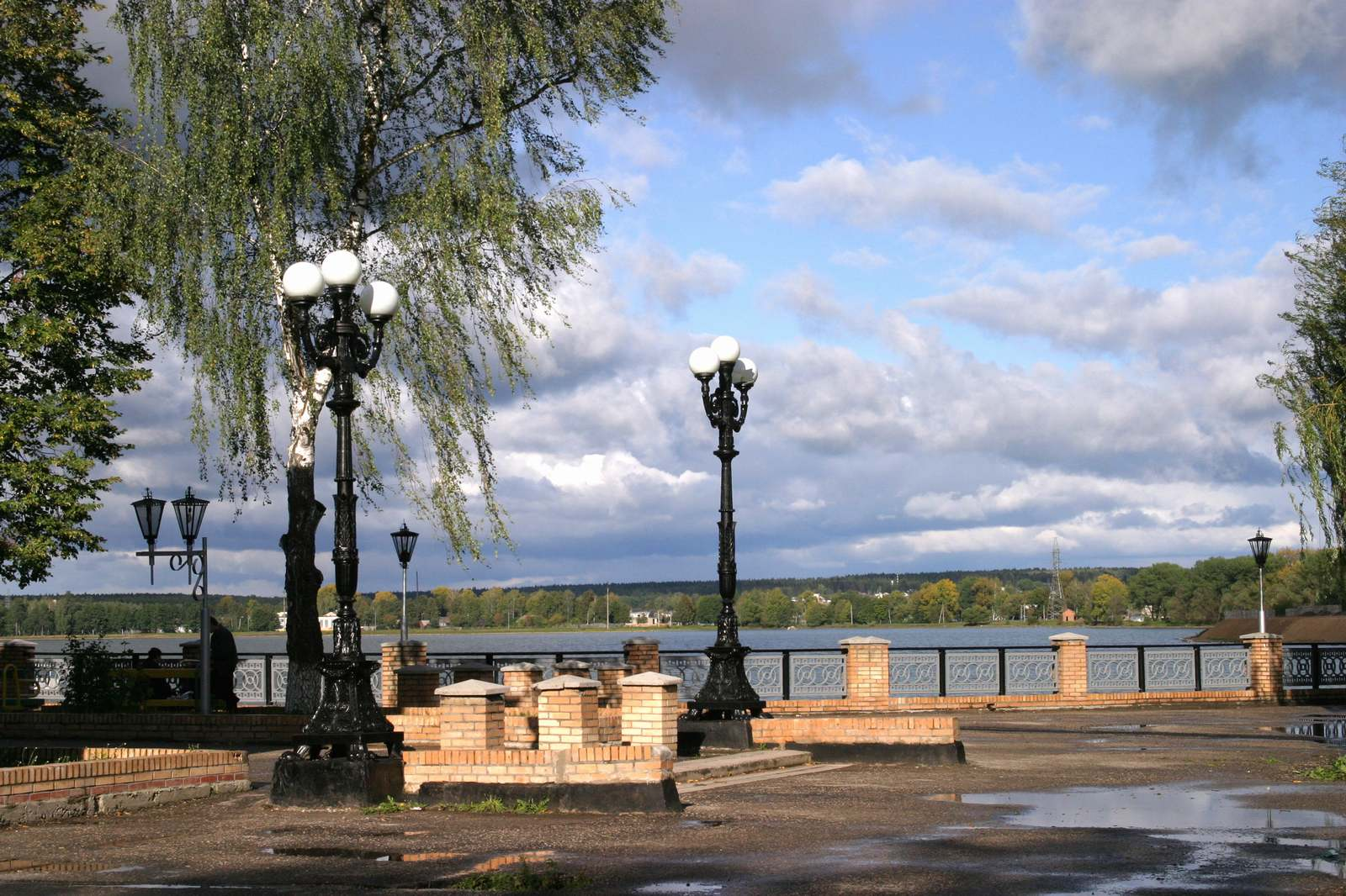 Набережная г.Людиново